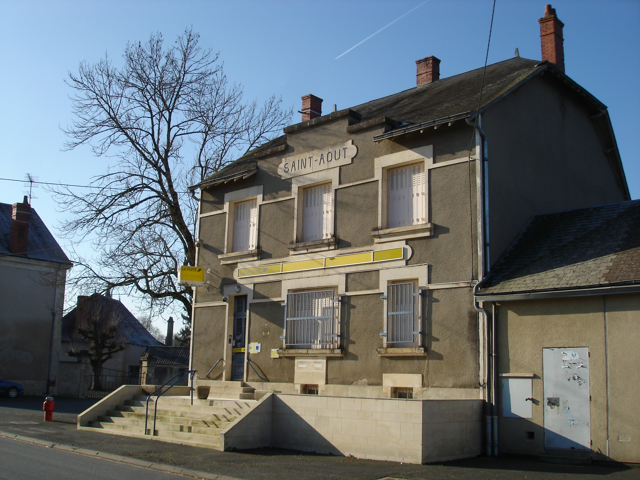 Saint-Août (36) : Le bureau de poste.